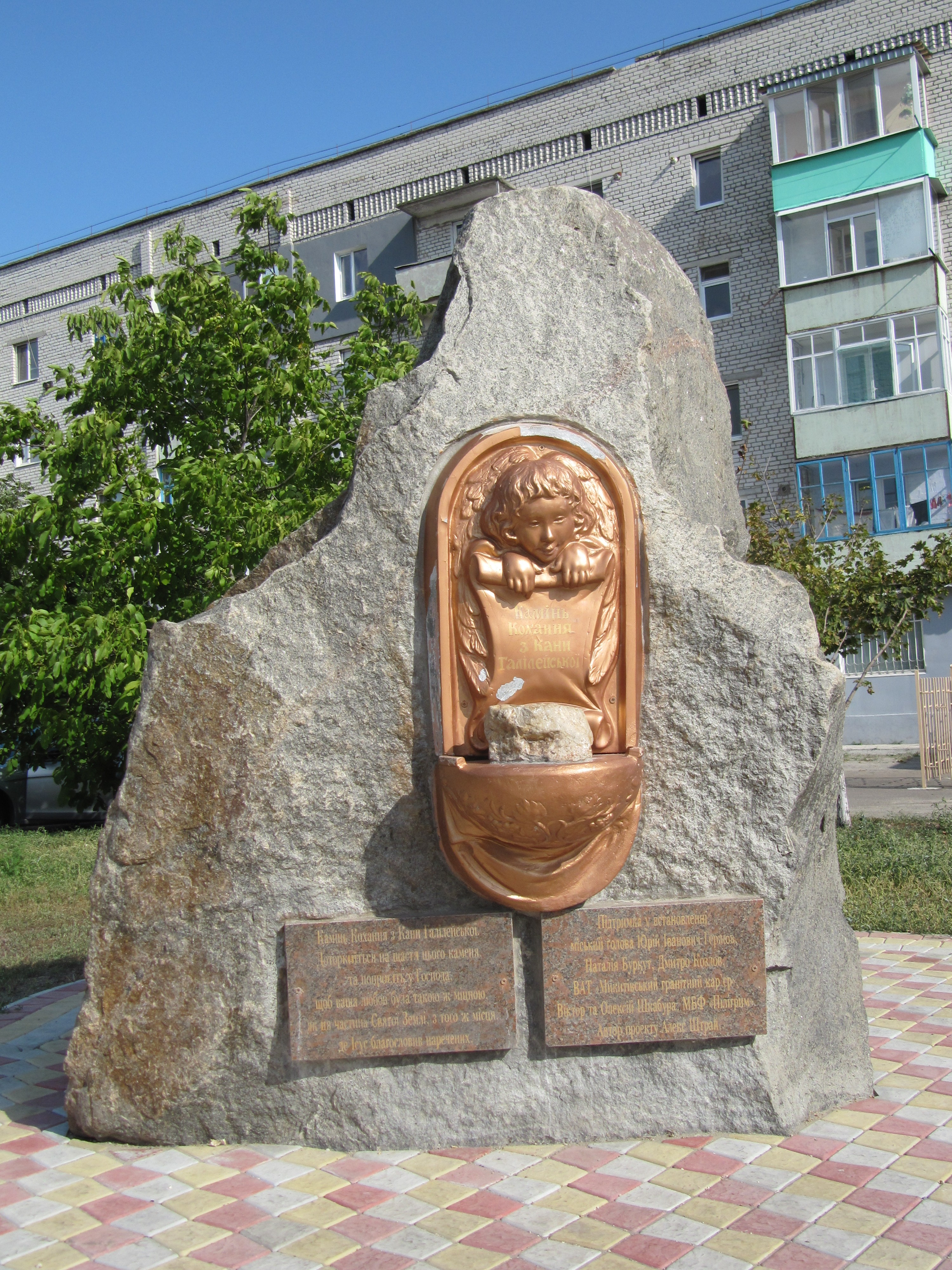 Вознесенськ, камінь Кохання з Кани Галілейської Миколаївська весна у Вікіпедії